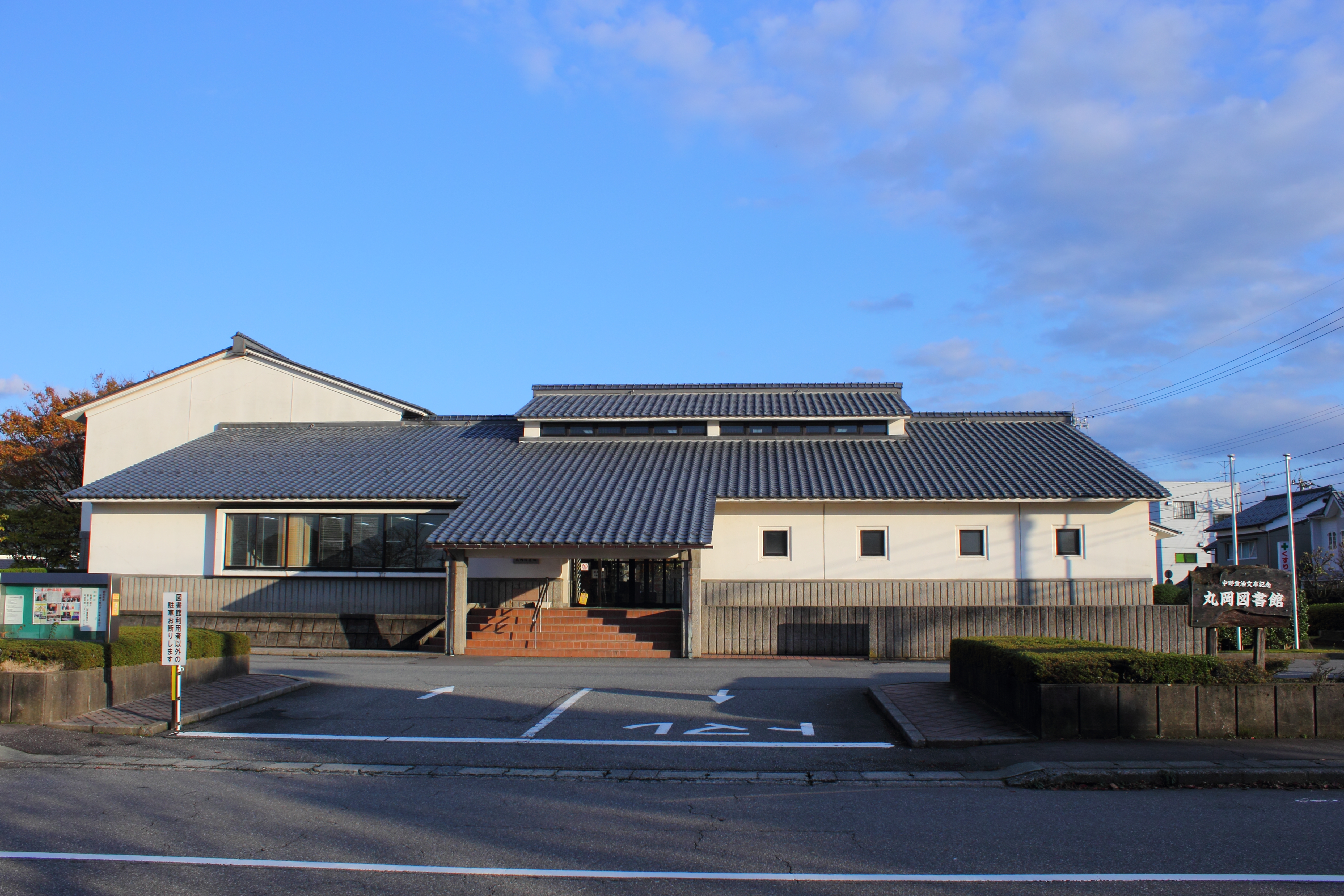 坂井市立丸岡図書館